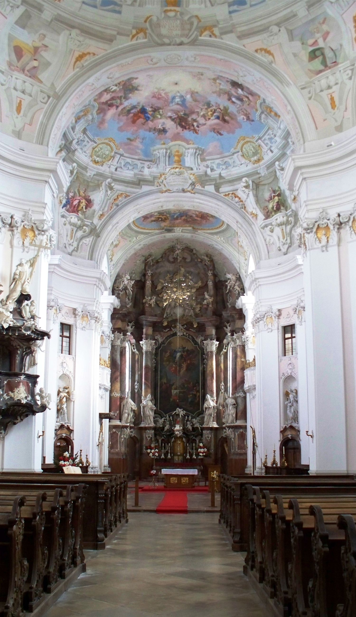 Im Inneren der Stiftskirche von Engelszell.